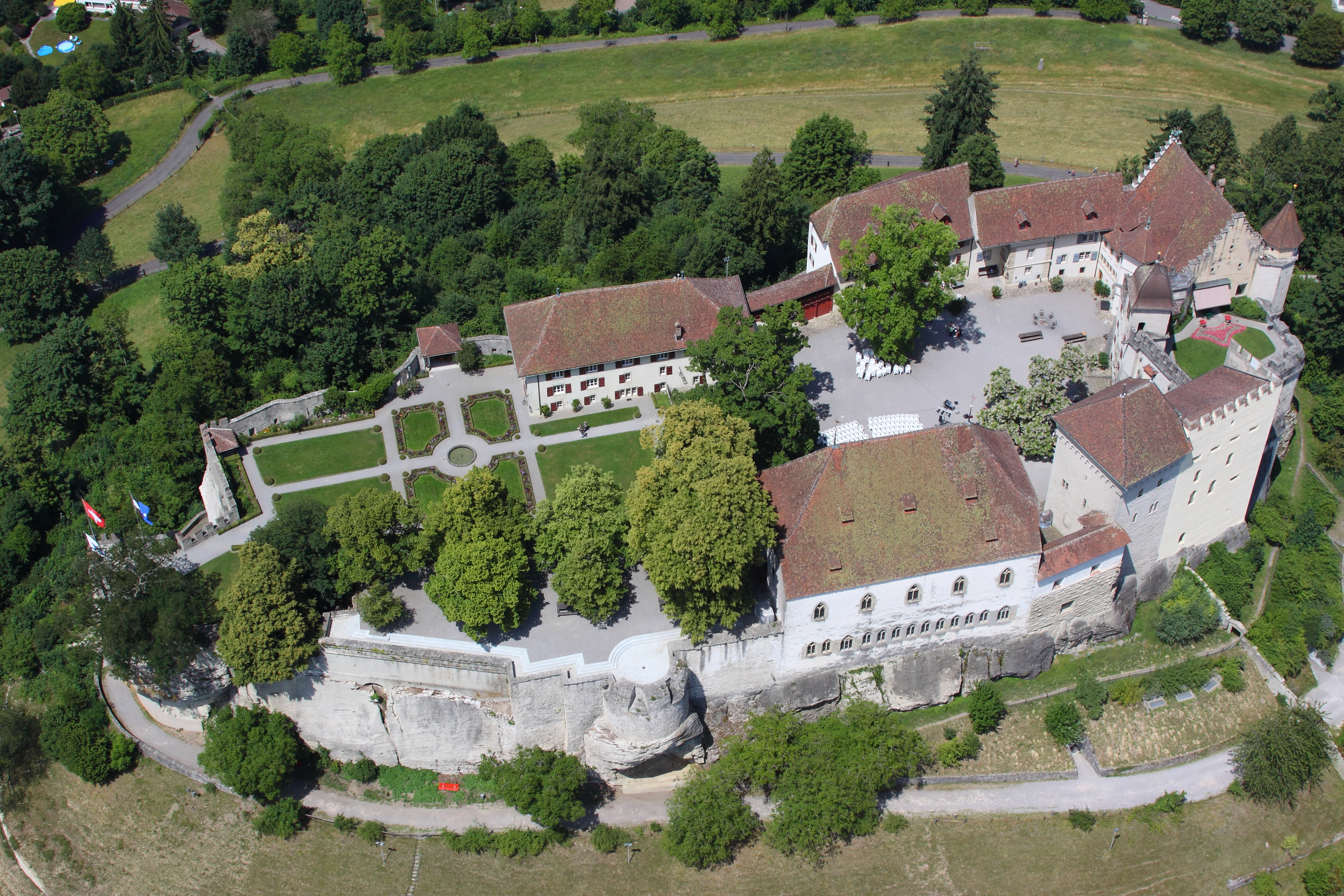 Schloss Lenzburg aus der Luft